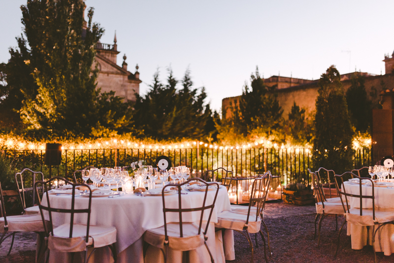 Jardines del Palacio en una de nuestras bodas WW